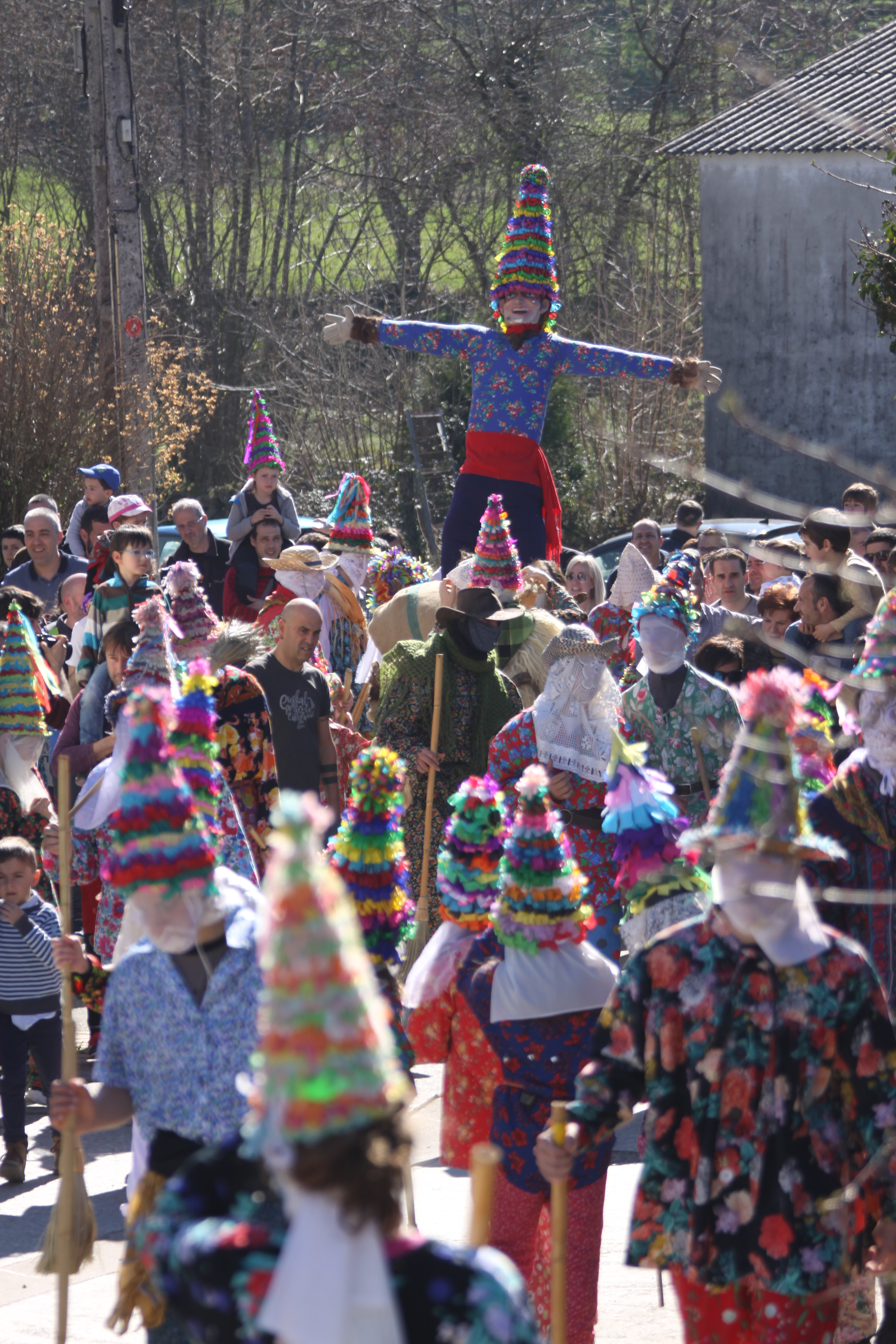 Miel Otxin précédés deTxatxus à Lantz en 2020